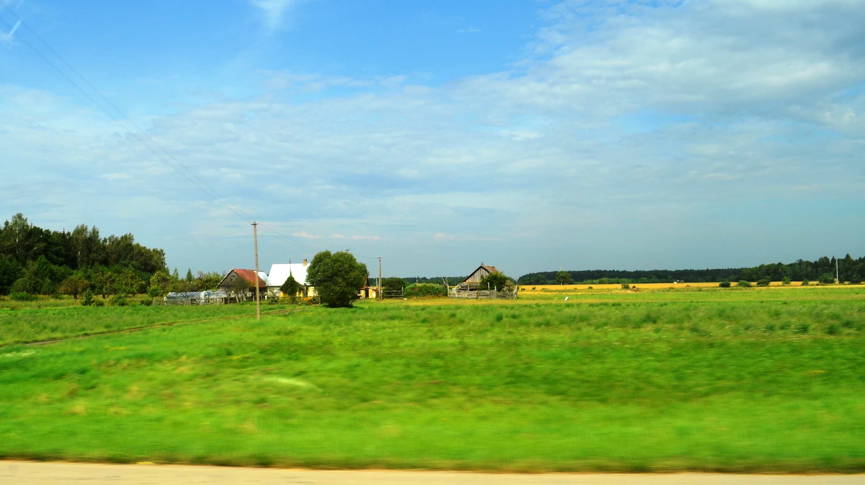 Tutiškiai, Panevėžio r.